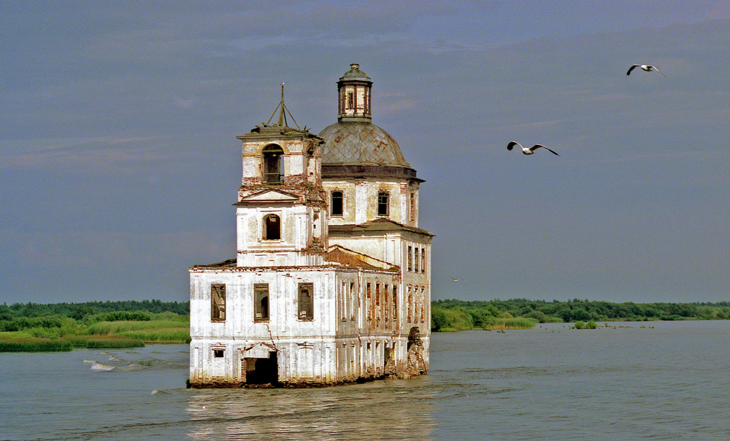 Verfallene Kirche